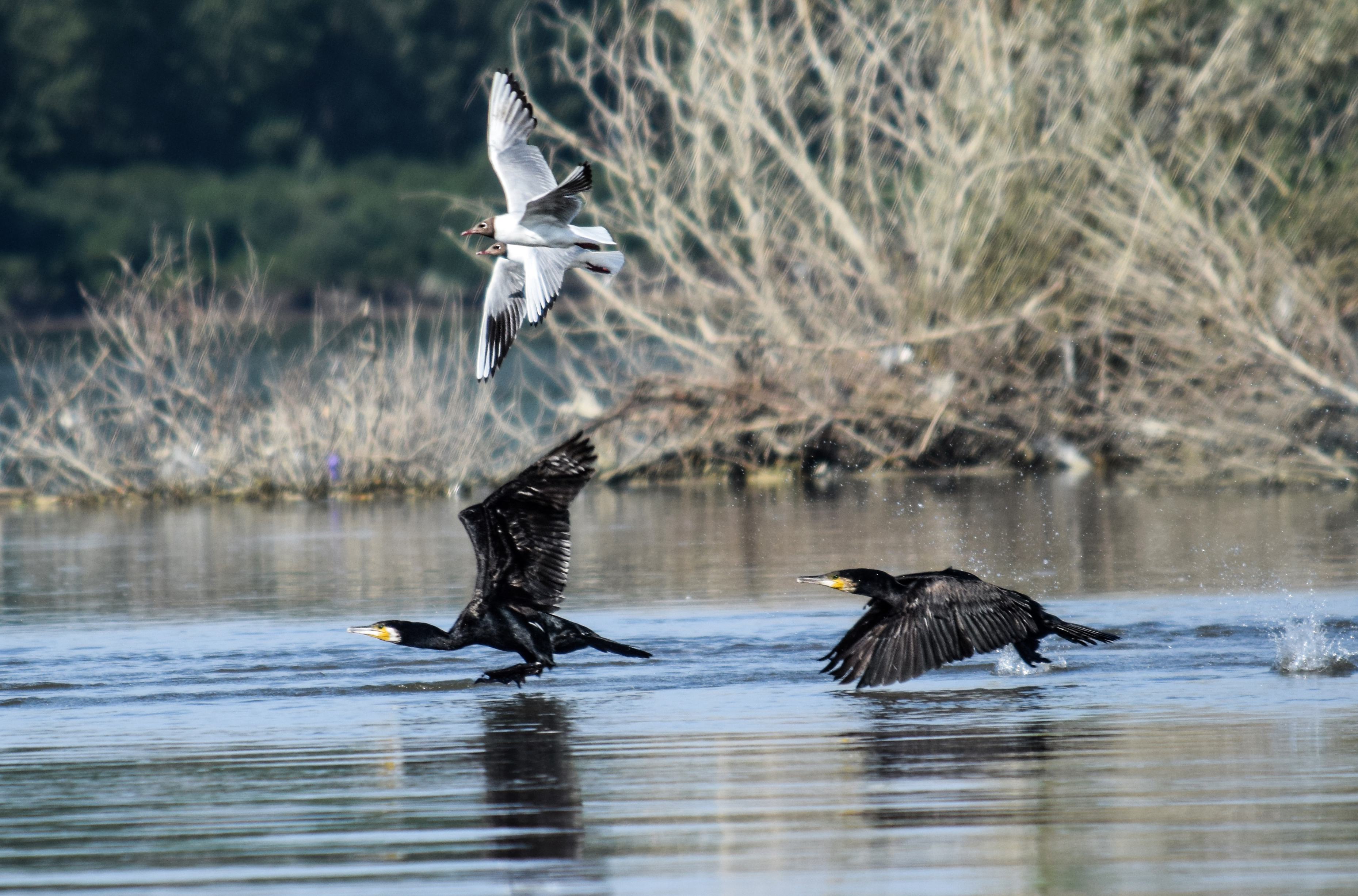 Голям корморан (Phalacrocorax carbo) и Речна чайка (Chroicocephalus ridibundus) - Остров Козлодуй